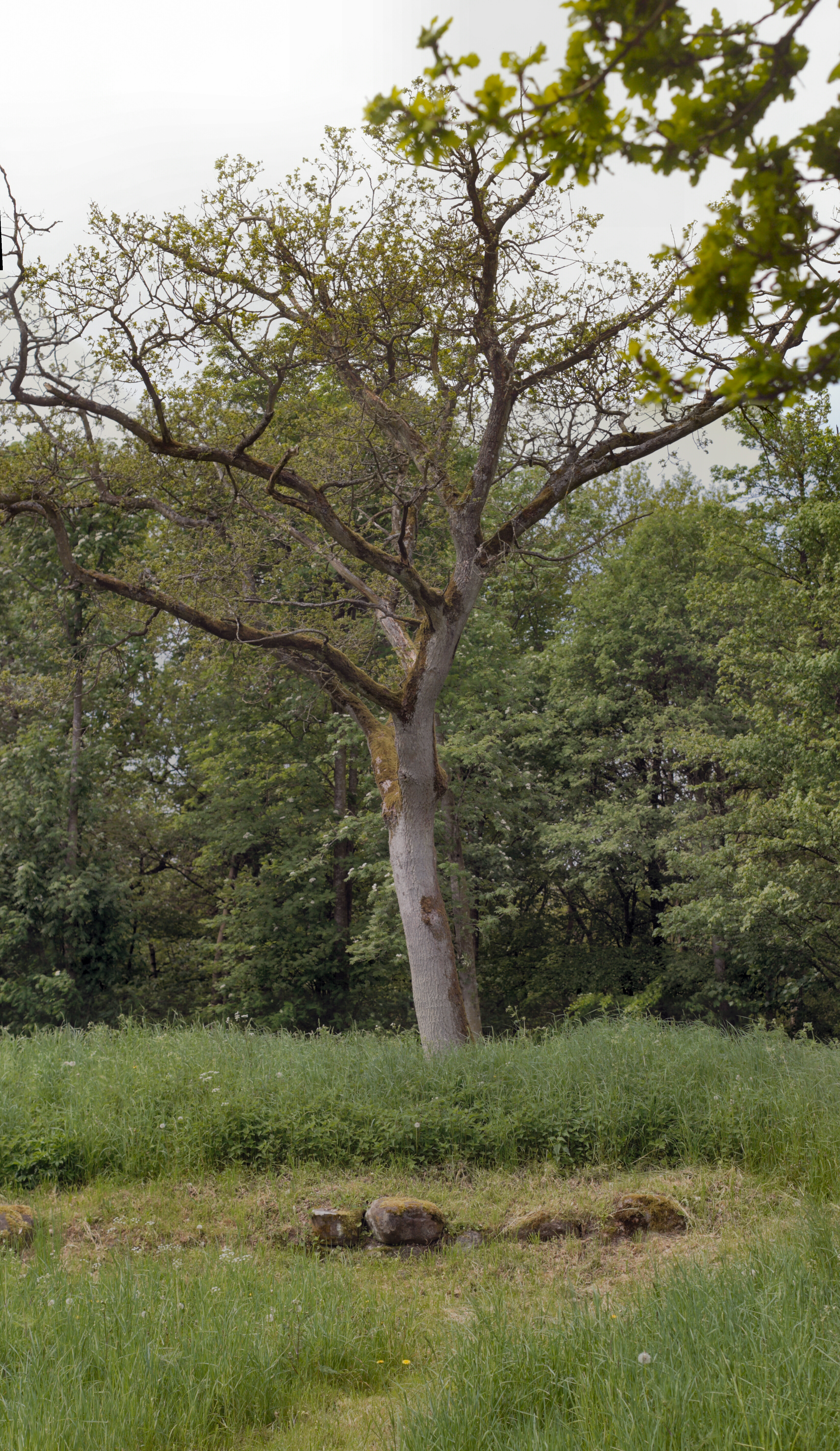 Bjarup Ødekirke - Tomten efter Bjarup kirke hvor et egetræ er plantet